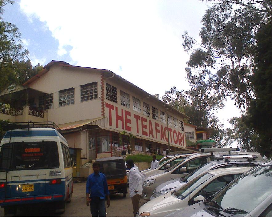 ద టీ ఫ్యాక్టరీ, ఊటీ